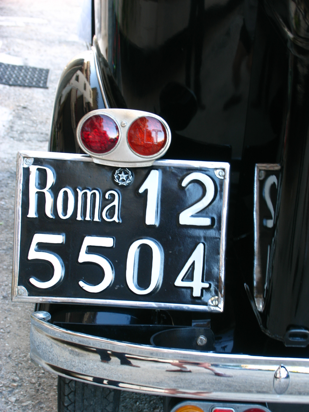 Vecchia targa su una Fiat Balilla del 1933